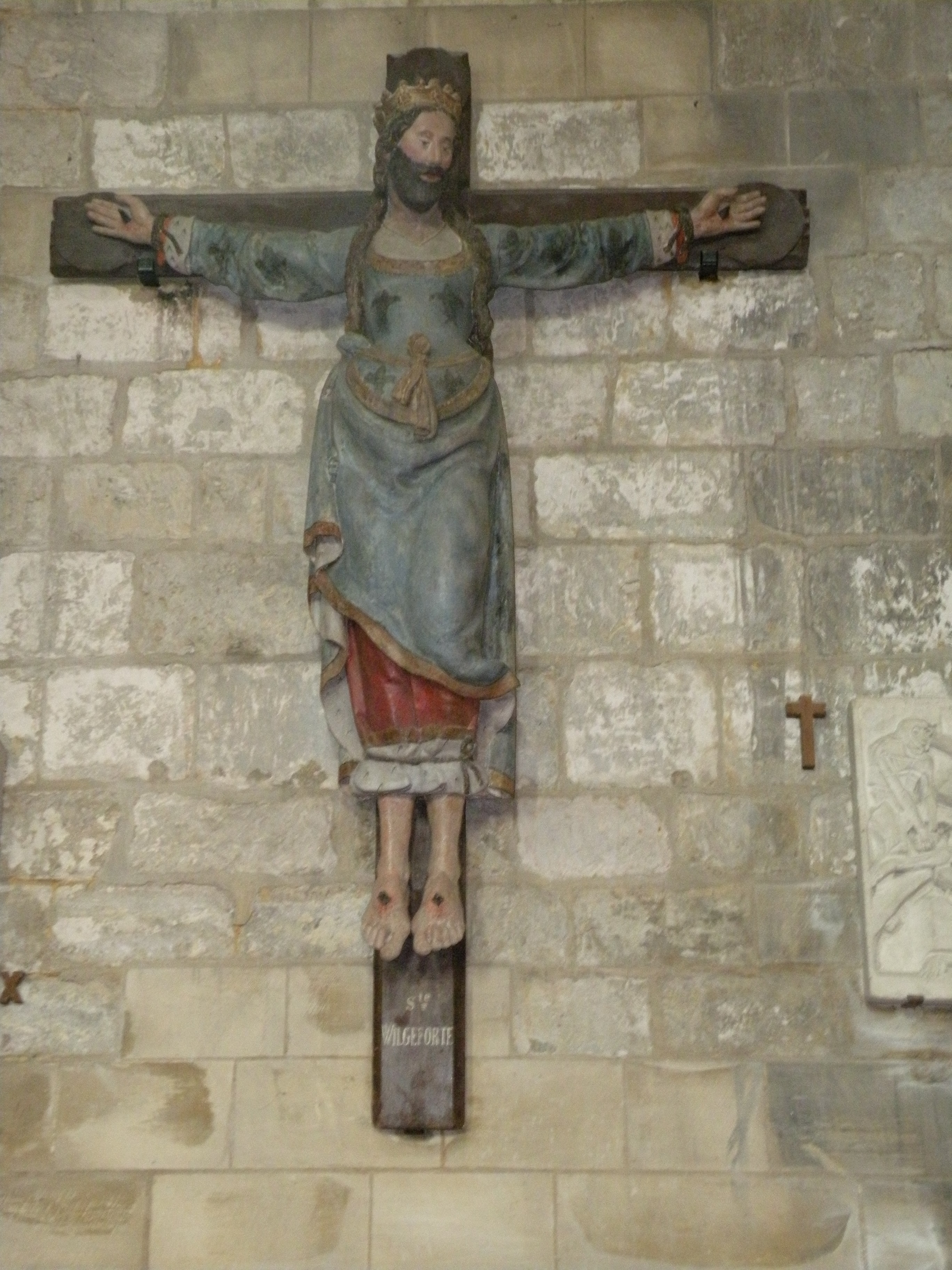 statue en bois du XVIeme de Sainte Wilgeforte dans l'Église Saint-Étienne de Beauvais